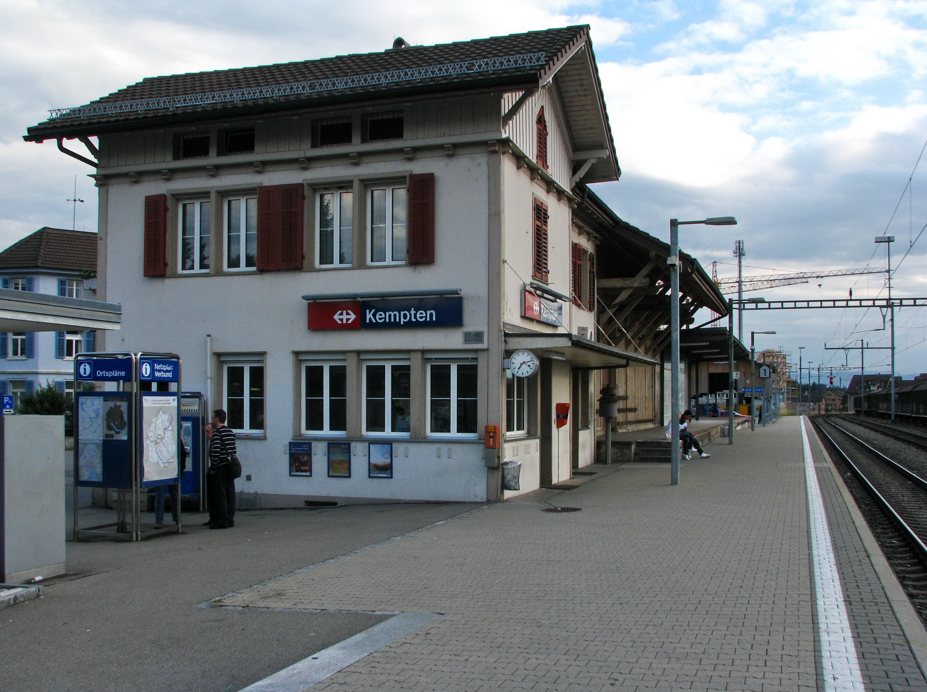 Wetzikon-Kempten (Switzerland) train station